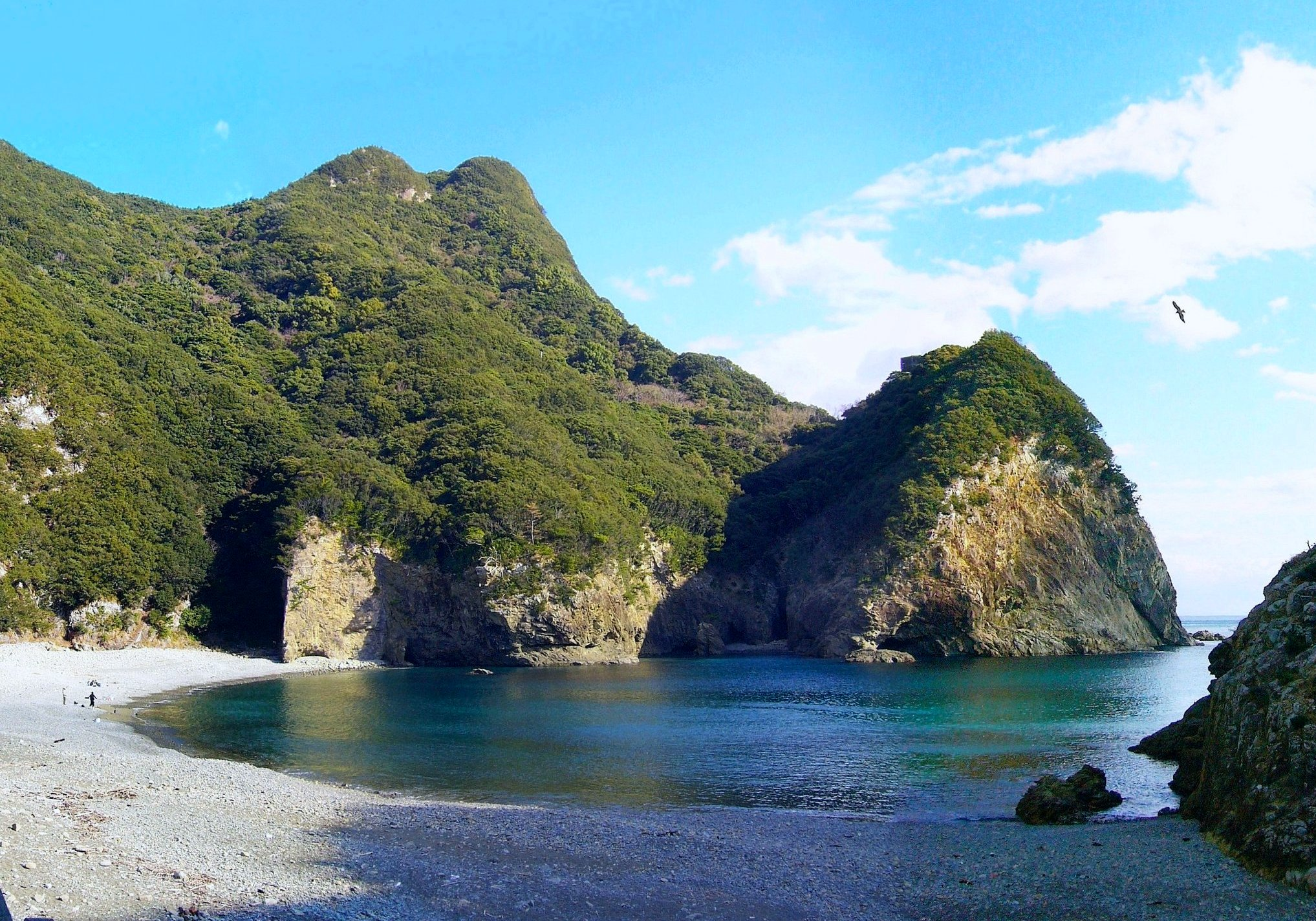 千羽海岸 外ノ牟井（とのむい）の浜